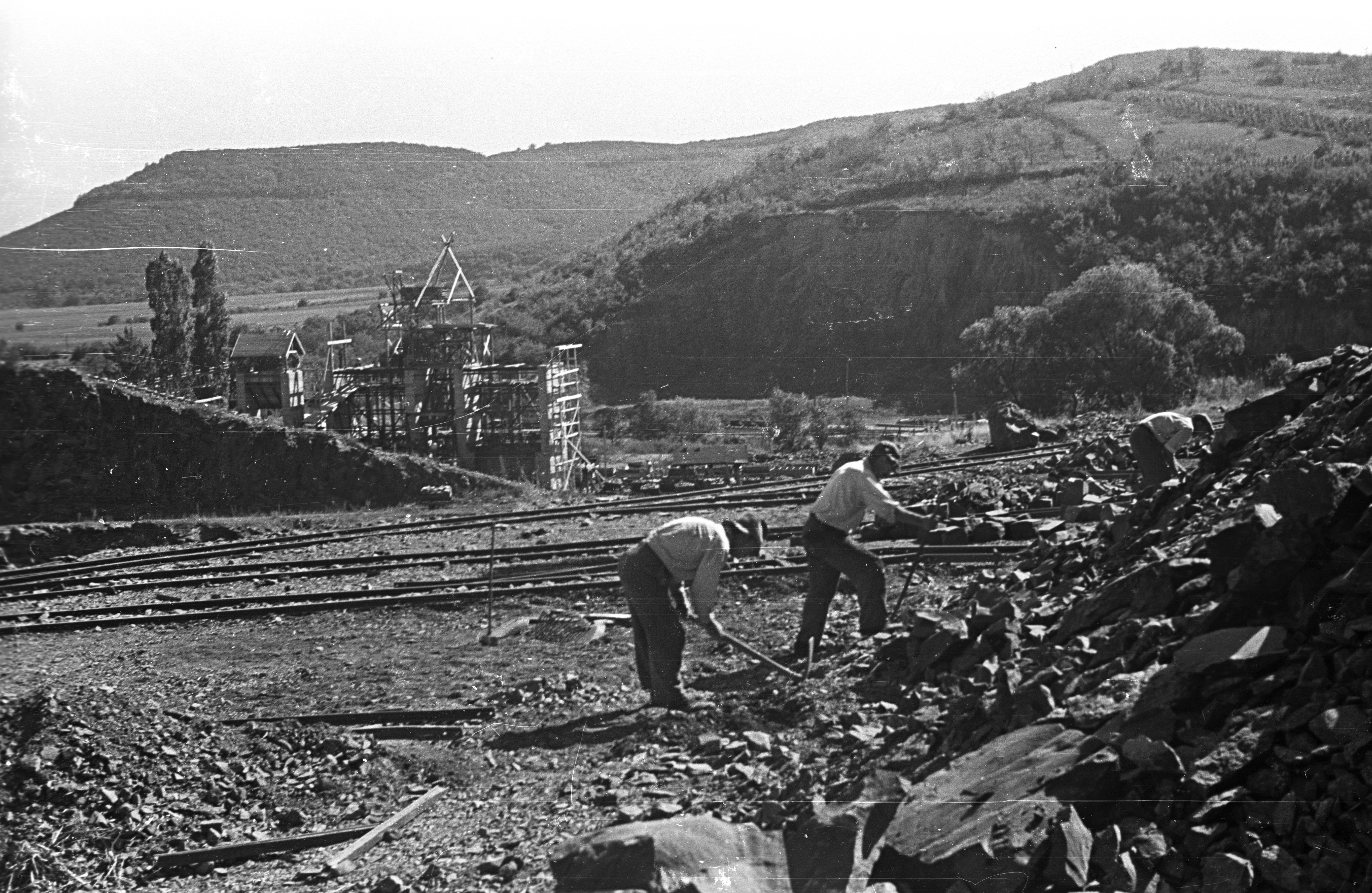 Mulató-hegy, kőbánya, előtérben az iparvasút vágányai. Location: Borsod-Abaúj-Zemplén megye, Erdőbénye Tags: construction, stone mine Title: Mulató-hegy, kőbánya, előtérben az iparvasút vágányai.